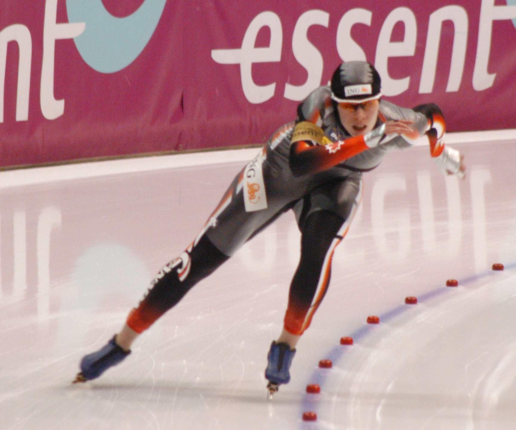 Christine Nesbitt (CAN) at a World Cup speedskating in Heerenveen (NED)